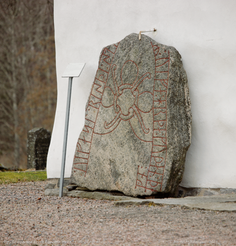 Runsten Vg 151 Eggvena kyrka Eggvena socken Kullings härad